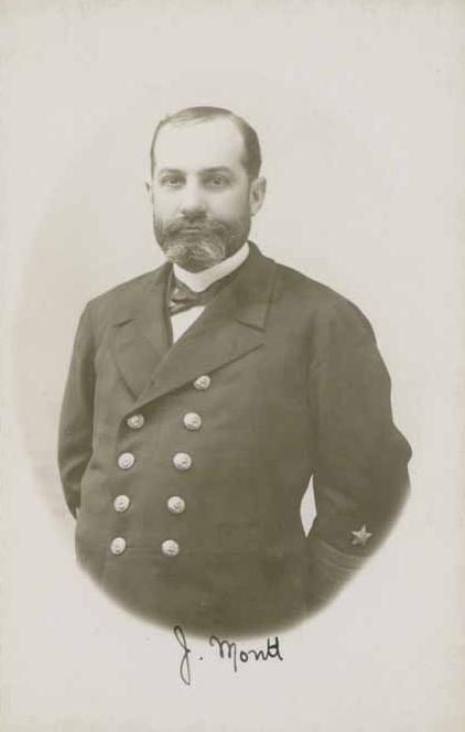 Jorge Montt Álvarez, (Casablanca; 26 de abril de 1845 - † Santiago; 9 de octubre de 1922). Fue Marino y político chileno y Presidente de Chile.